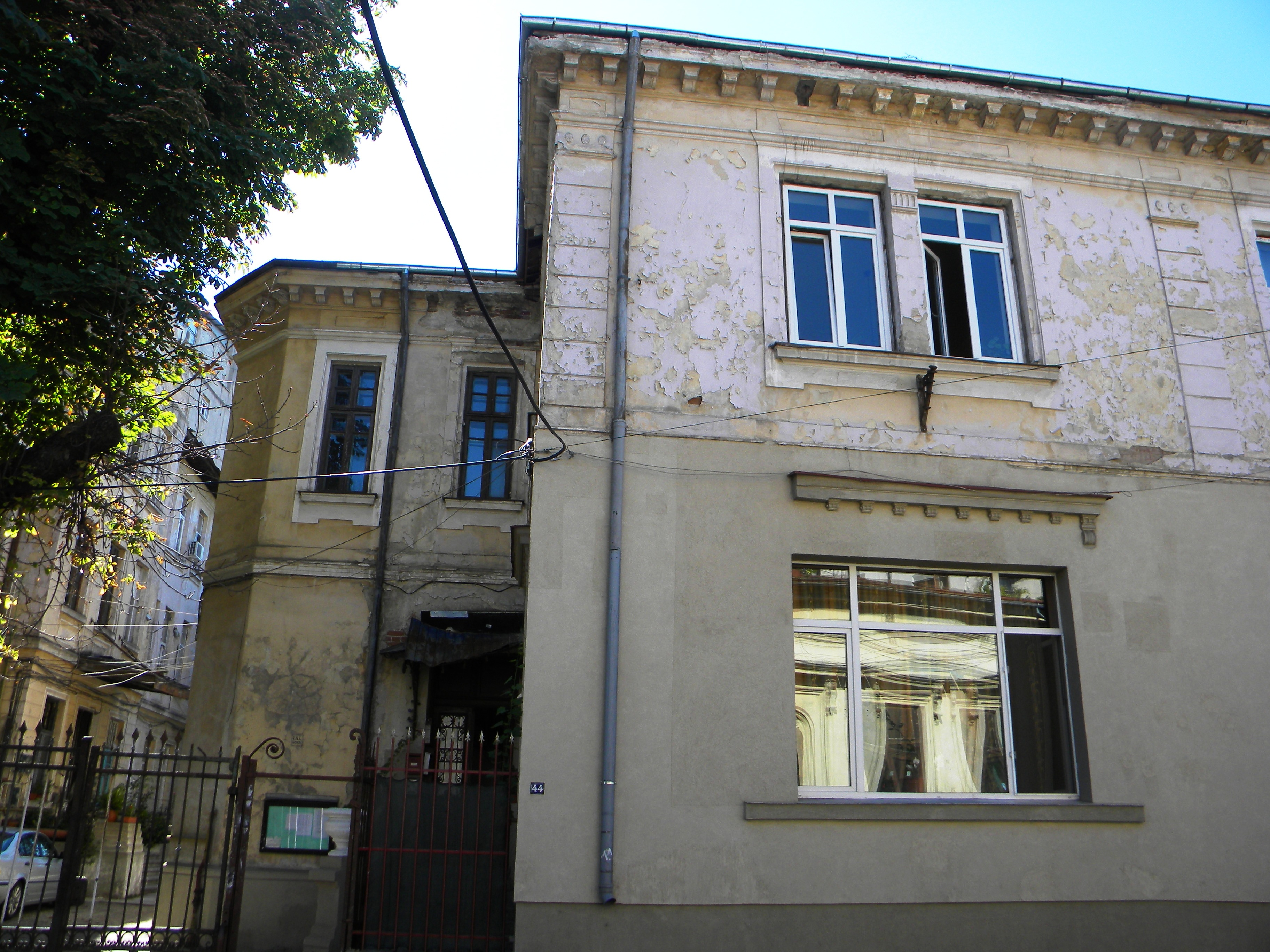 Bucuresti, Romania, Strada Hristo Botev nr. 44 (casa), sect. 3